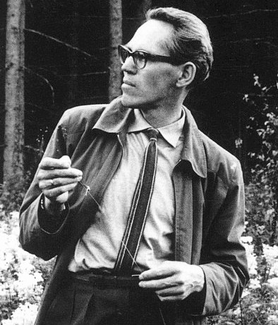 Yngve Ekström ca. 1965